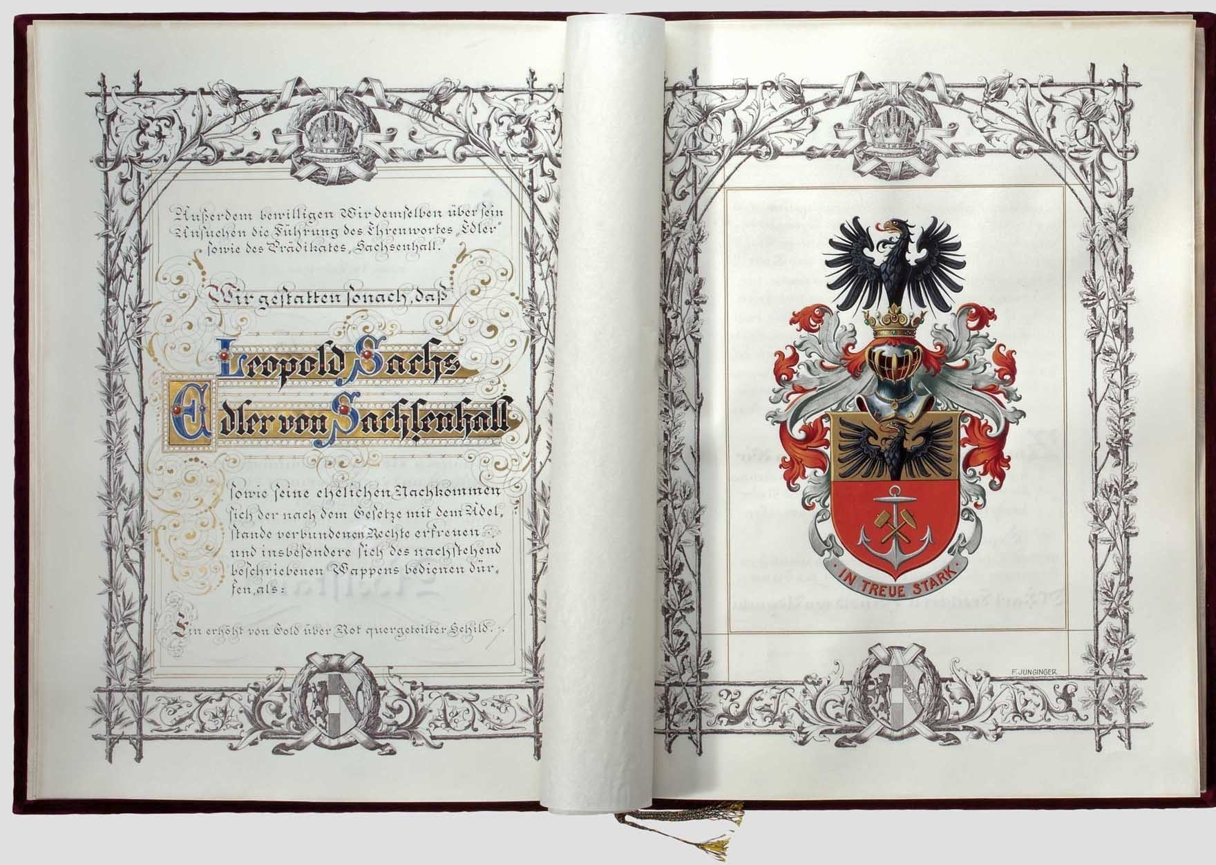 Adelsdiplom von Franz Joseph I. (Kaiser von Österreich 1848-1916) für den kaiserlichen Rat und Großindustriellen (Vizepräsidenten der Österreichischen Nordwest-Dampfschiffahrts-Gesellschaft und der Jaworzno'er Steinkohlen-Gewerkschaft) Leopold Sachs (* Wien, 9. Jänner 1848; † ebenda, 3. September 1920) mit Verleihung des Prädikates "Edler von Sachsenhall". Adelsdiplom ausgestellt Wien, 25. März 1912, mit eigenhändiger Unterschrift des Kaisers. Pergamentlibell (Format ca. 38,5 x 29 cm) aus 4 Pergamentbögen, darauf der Urkundentext auf sieben Seiten in mehrfarbiger Handkalligraphie, gedruckte Bordüre. Wappendarstellung signiert "F(riedrich) Junginger". Innenseite des Adelsdiplom mit weißem Seidenmoiré ausgeschlagen. Purpurner Samteinband mit goldgeprägter Doppeladlerdarstellung, anhängendes Wachssiegel in bronzener Siegelkapsel, Metallkassette.